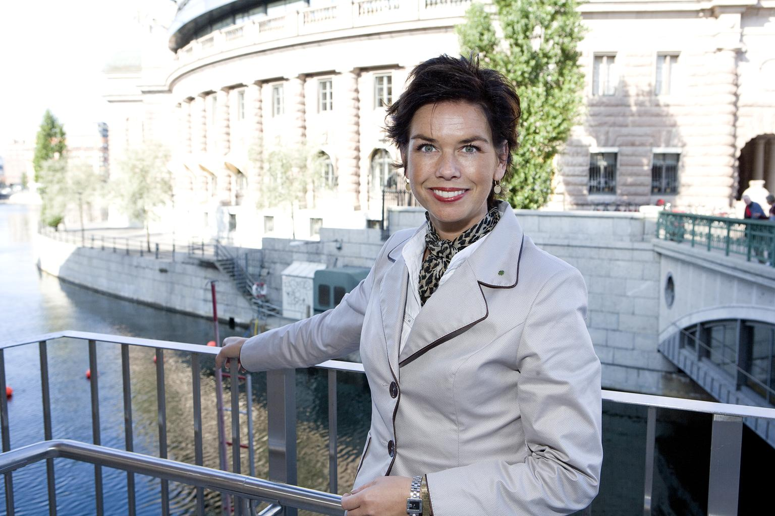 larsen_sofia_02